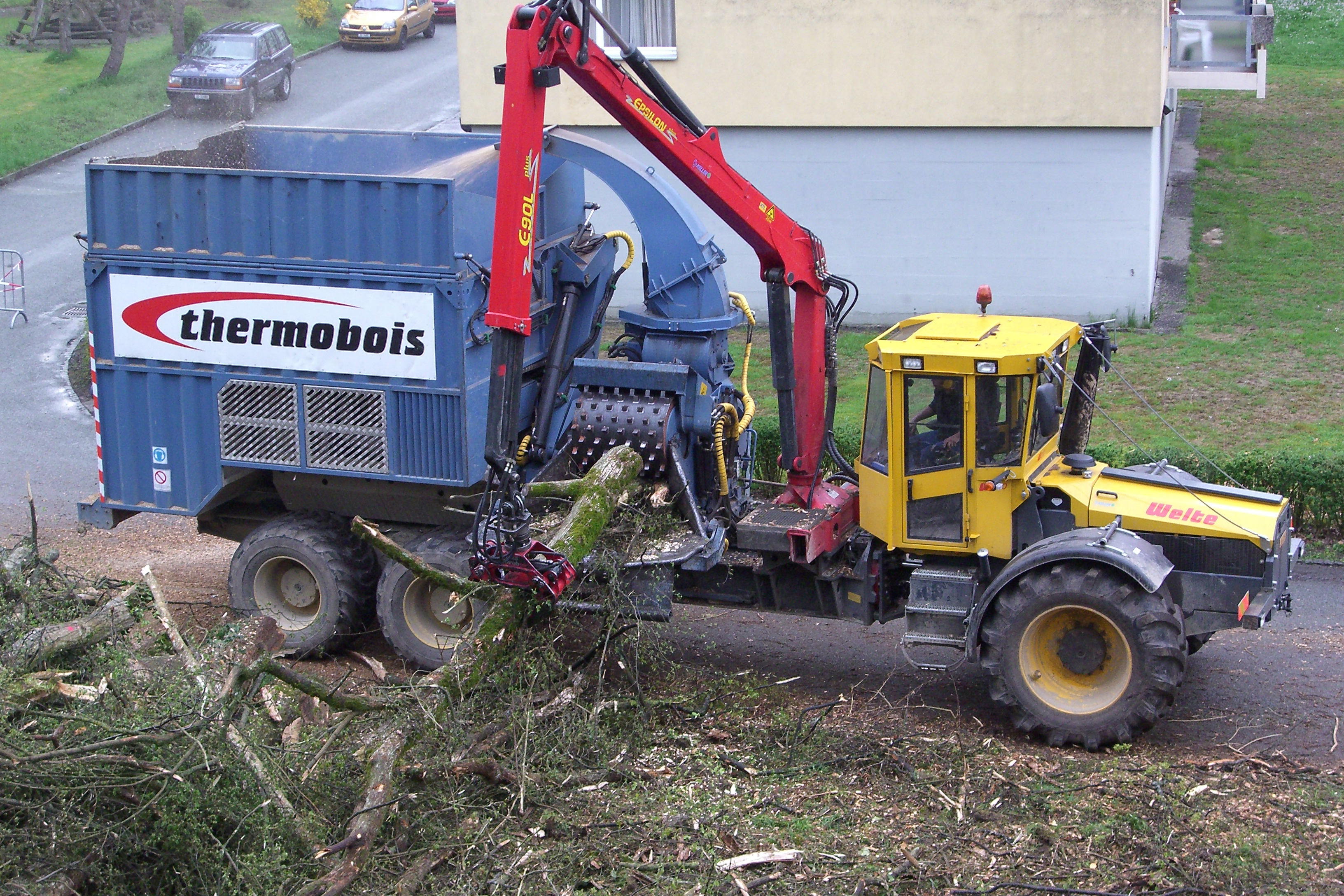 Vue latérale en entier de la déchiqueteuse mobile utilisé par Thermobois (montée sur un chassis 6×6 de Welte), décrite dans l'article "Thermoréseau"